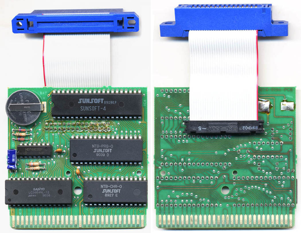 ファミコンカートリッジ サン電子 「なんてったって!!ベースボール」 の基板